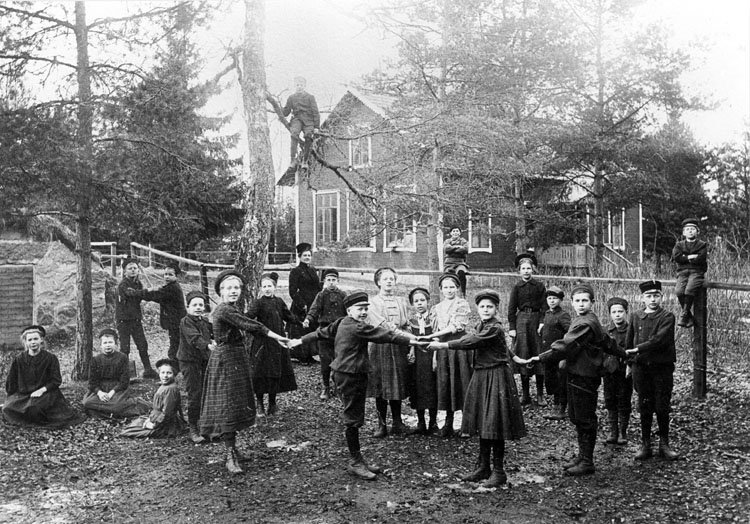 Görvälns skola, Järfälla, klasskort från början av 1900-talet. Arrangerad ringlek med lärarinnan Fanny Lagerlund. Skolan i bakgrunden. Stående längst t.h. Eskil Karlsson (med huvudbonad), son till rättare Karlsson på Görväln.